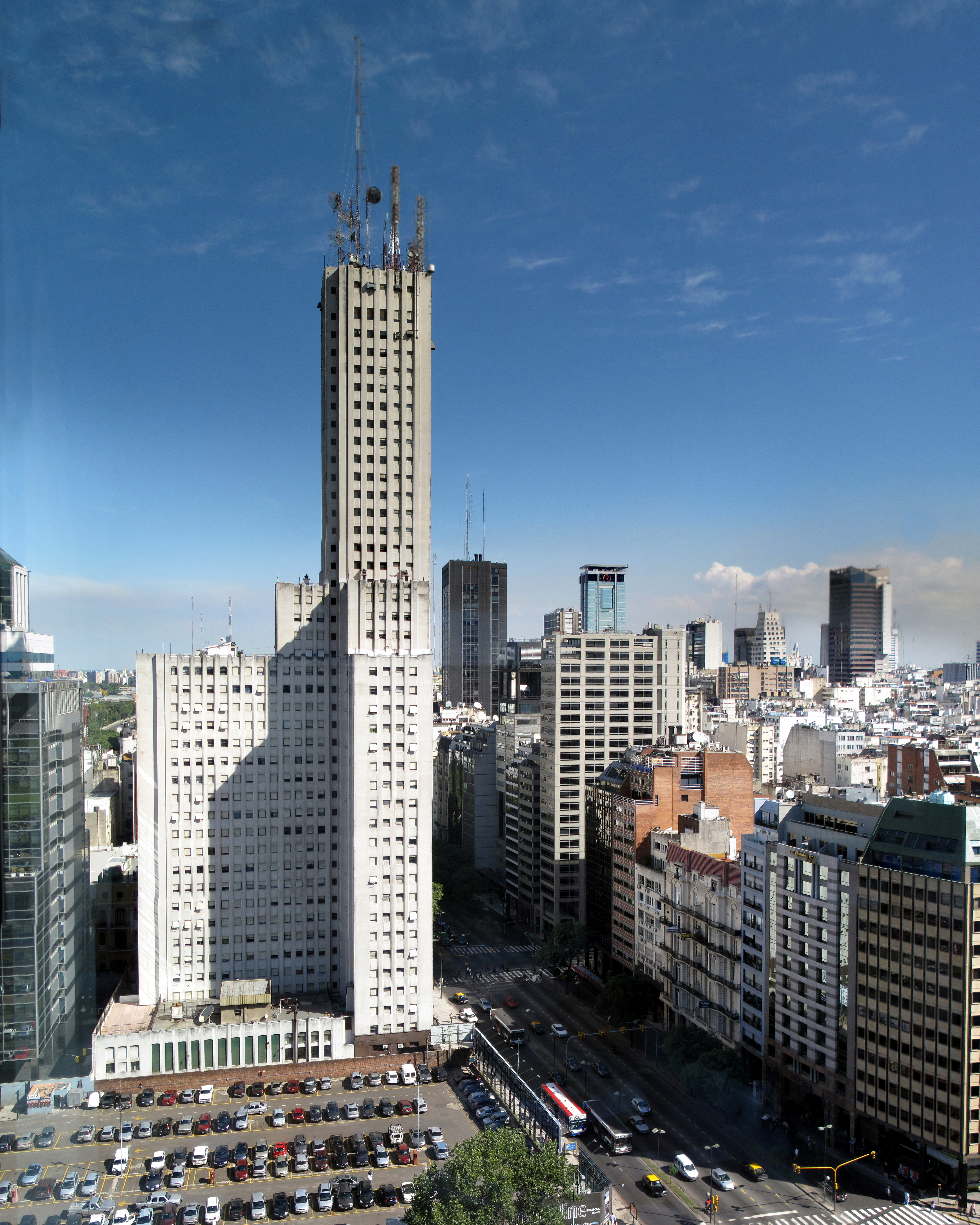 Alas Building (1950). Buenos Aires, Argentina. 36mpx panorama.